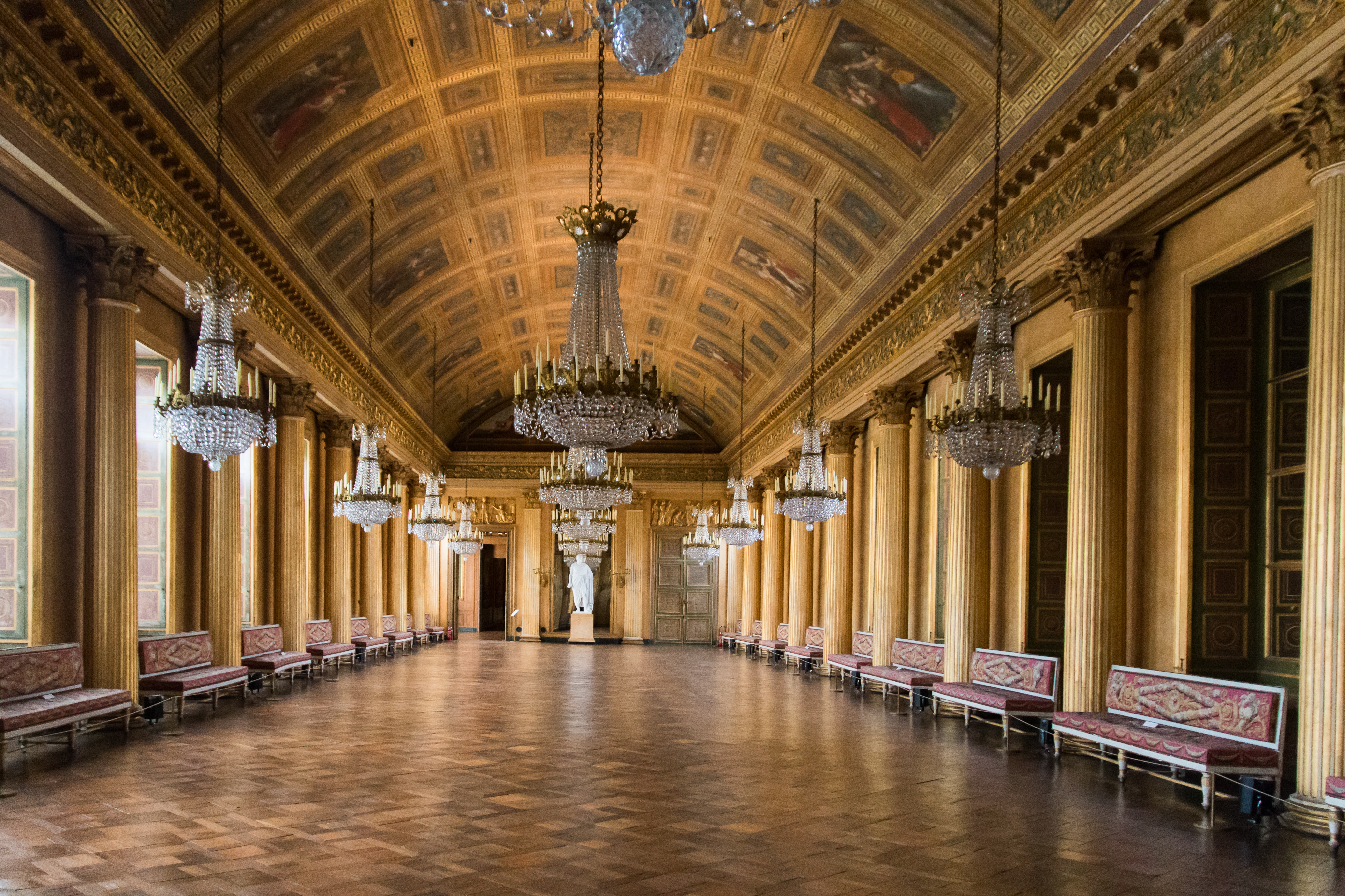 Ball gallery..